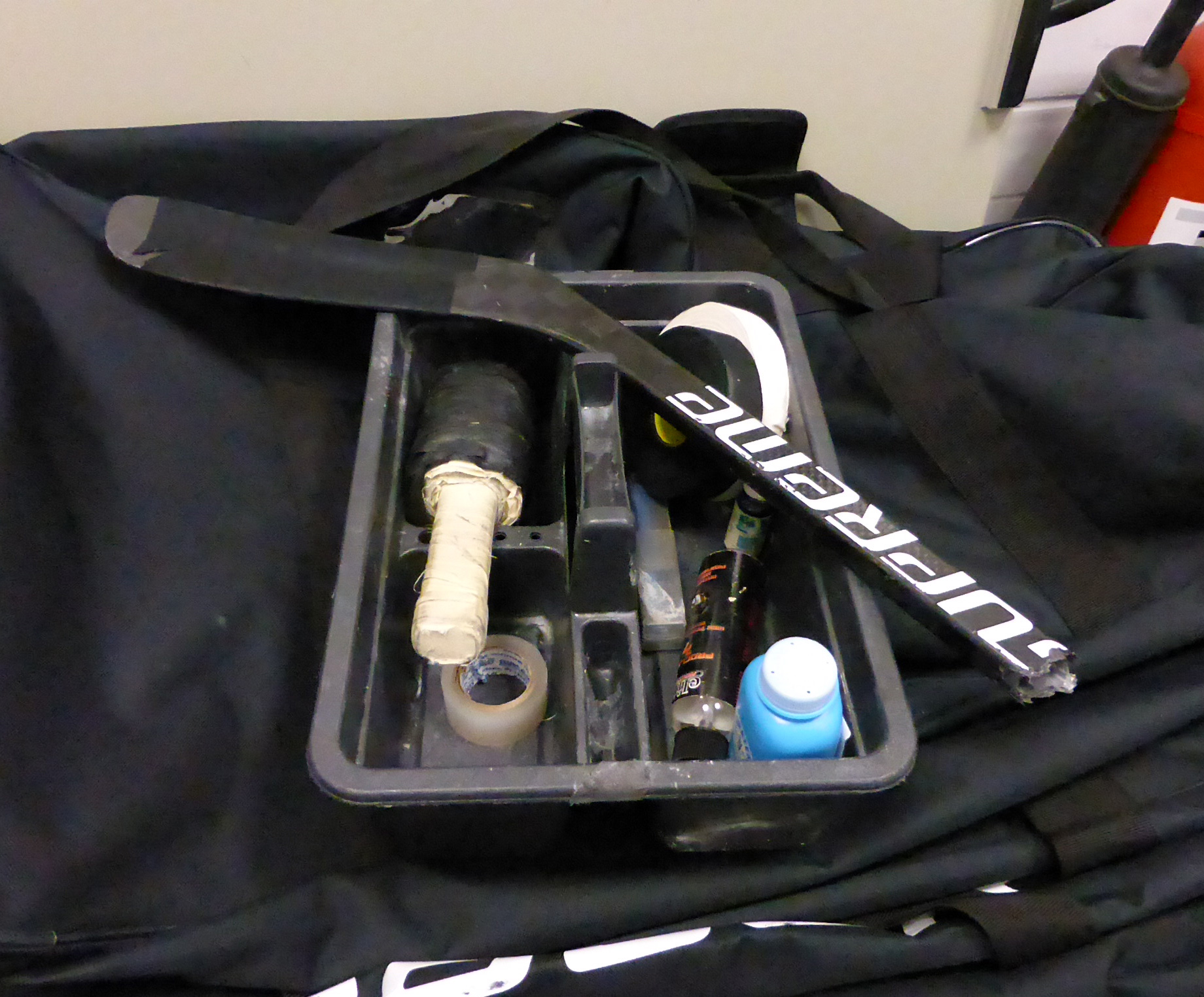 Carbon-Eishockeyschläger im Trainingszentrum (Kölnarena 2) des KEC.